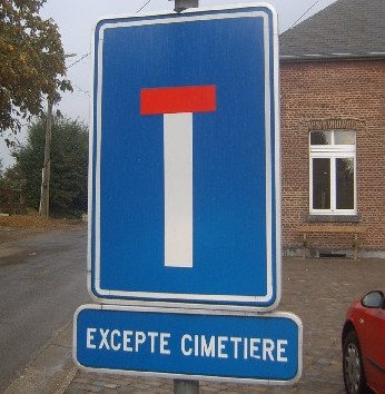 The sign says: "Dead End — Except Cemetery" - Quand la signalisation routière pousse au questionnement existentiel (Ambresin, commune de Wasseiges, environs Hannut en Belgique)